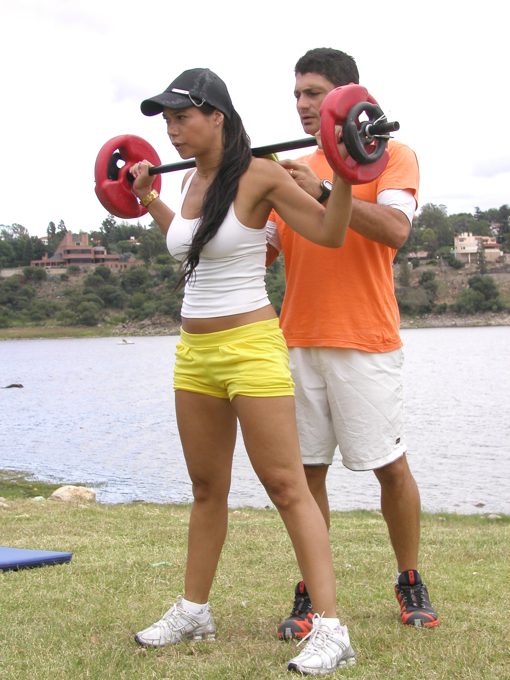 MARIANA DE MELO gimnasia